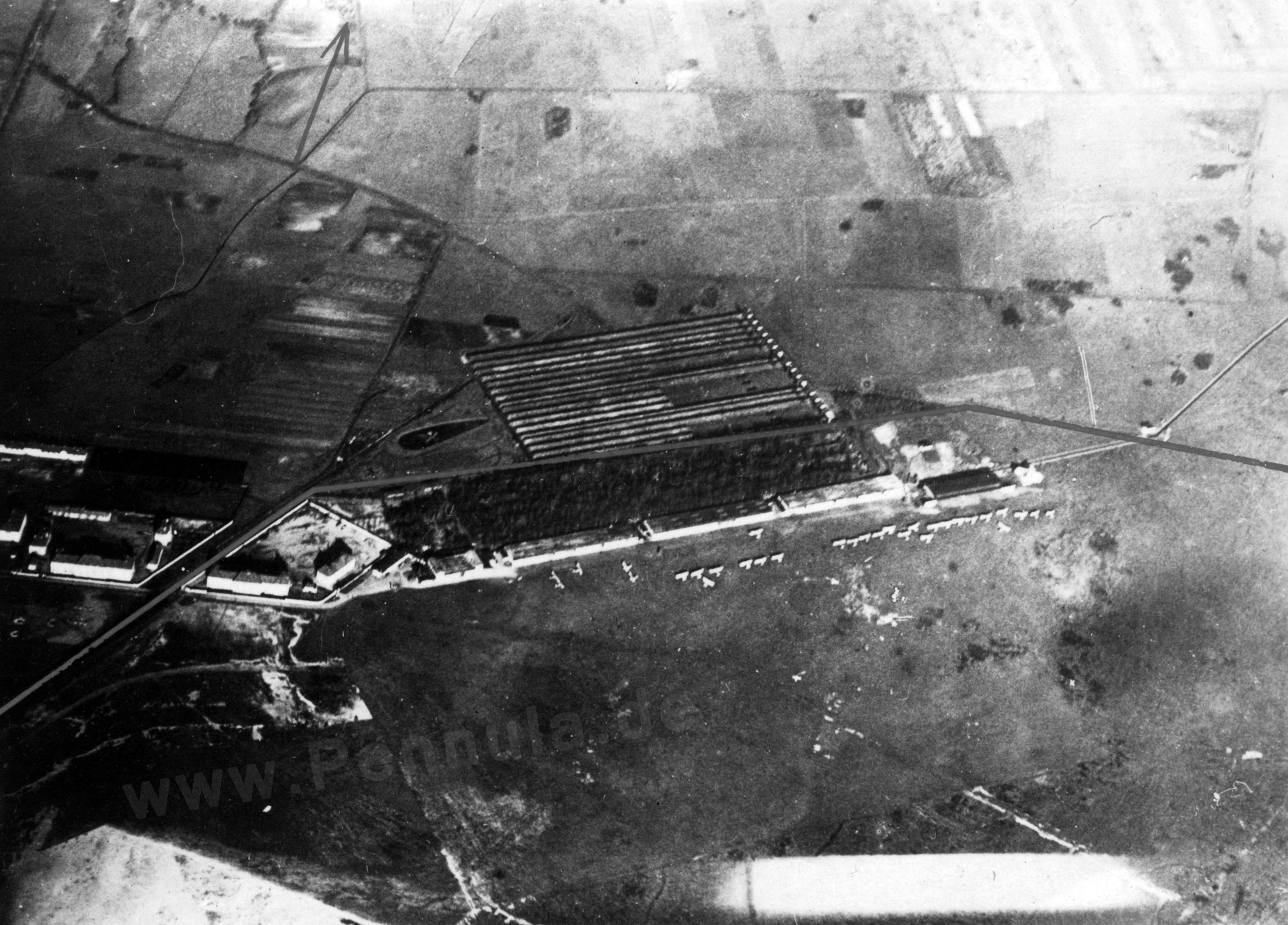 Luftbild-Aufnahme aus dem um 1917 erschienenen Flugplatz-Atlas, hier als Luftbildfotografie mit einem Blick über den Alten Flughafen in Hannover in der Vahrenwalder Heide. Der Scan der gemeinfreien Fotografie wurde mit dem Wasserzeichen versehen ...